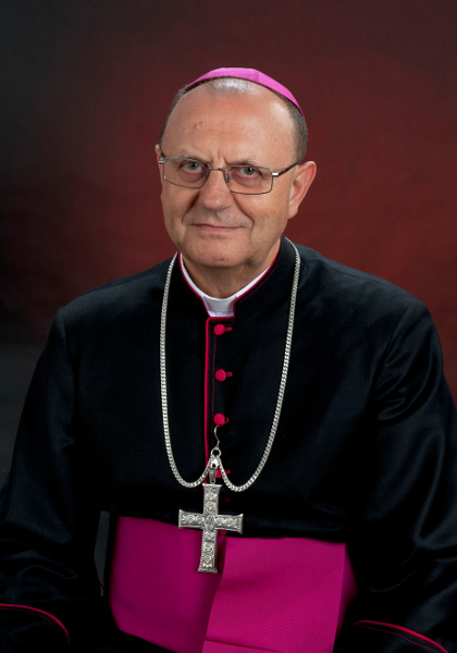 Biskup Tadeusz Pikus